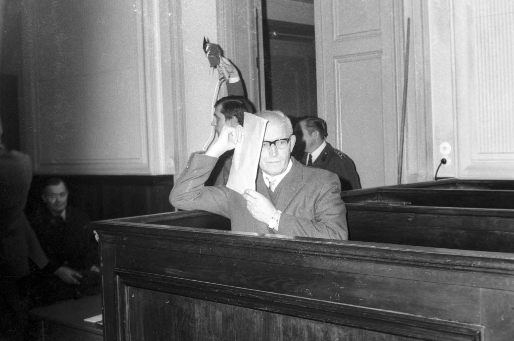 Der angeklagte Oberregierungsrat a.D. Heinz Richter, ehemaliger SS-Obersturmbannführer. Ihm wird vorgeworfen, im Januar 1945 den Befehl zur Erschießung von 600 Häftlingen des Zuchthauses Sonnenberg bei Frankfurt (Oder) an seinen Untergebenen Nickel weitergegeben zu haben. Der Prozess wird 1971 fortgesetzt.